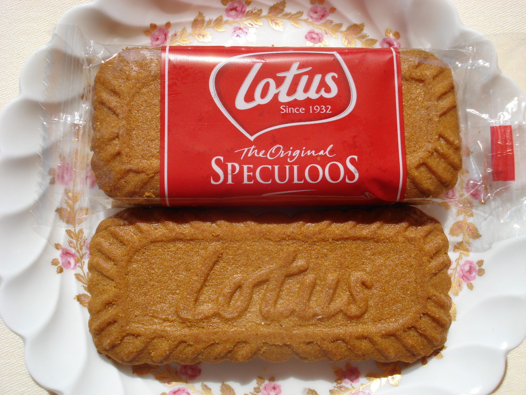 biscuit de speculoos de la marque belge Lotus